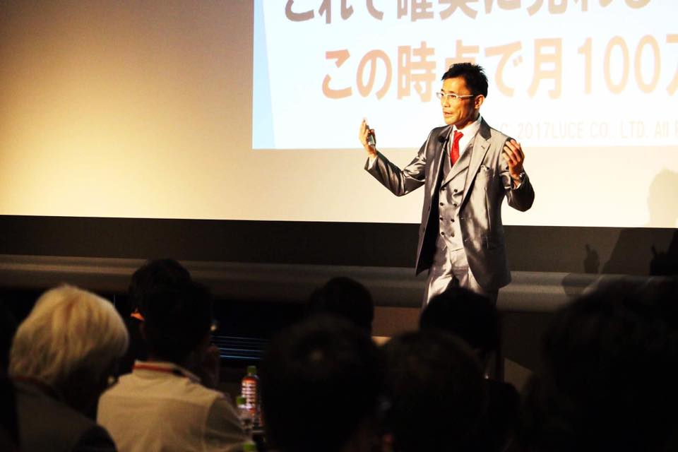 2017年5月17日 ベルサール九段 マーケティング白熱会議2017 西村公児講演